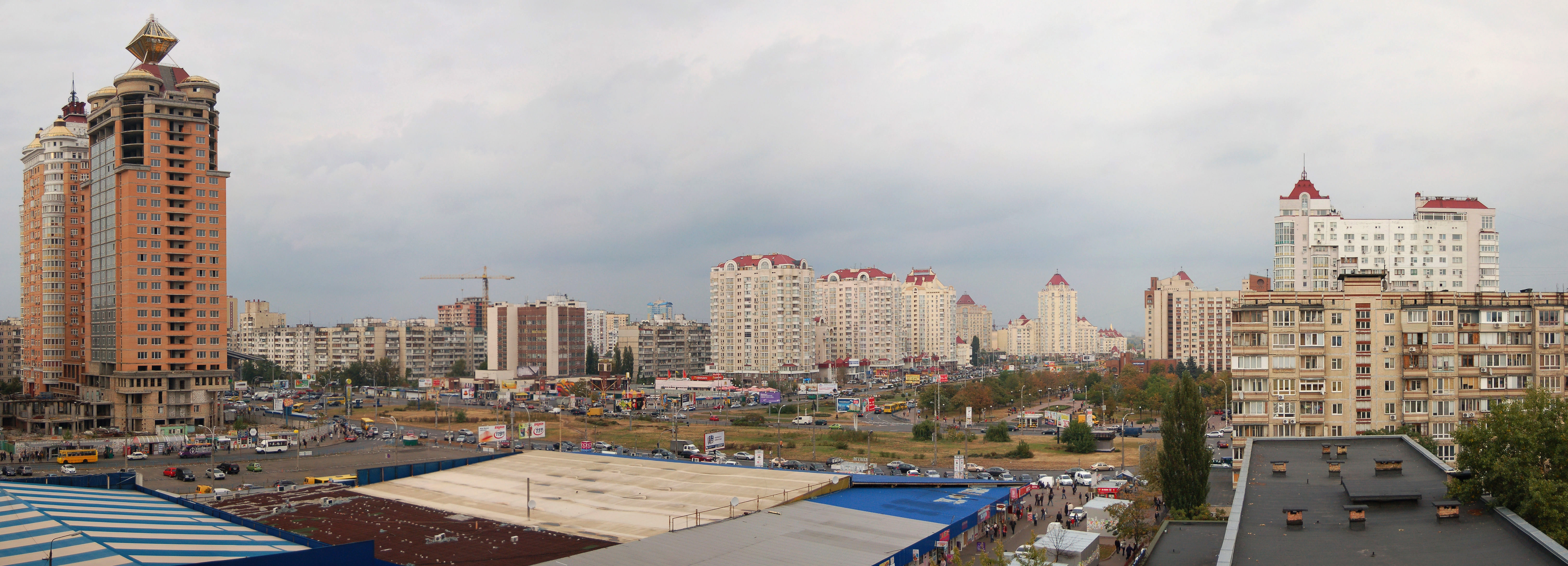 Мінська площа у Києві